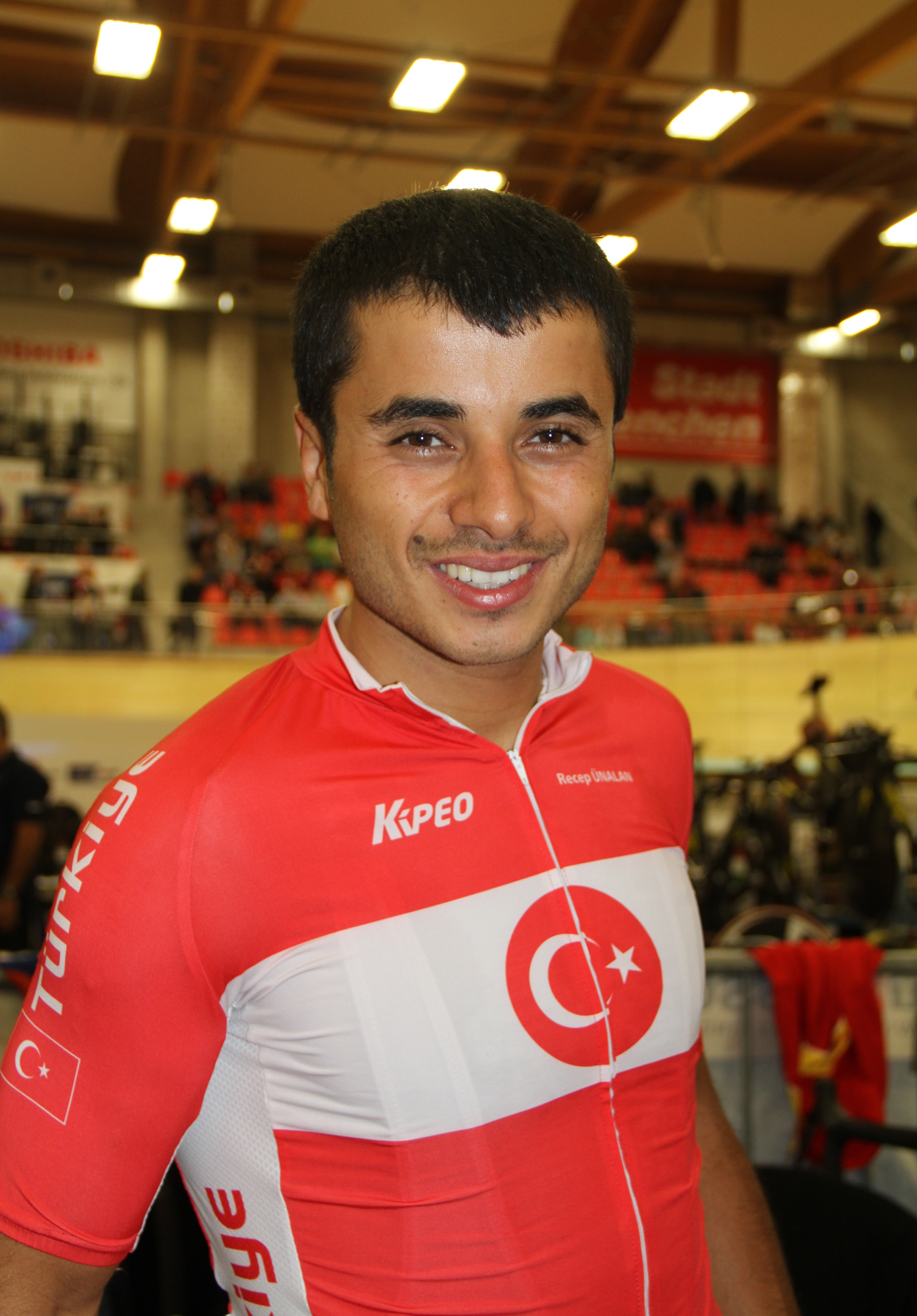 Recep Ünalan, türkischer Radsportler The making of this document was supported by the Community-Budget of Wikimedia Germany.